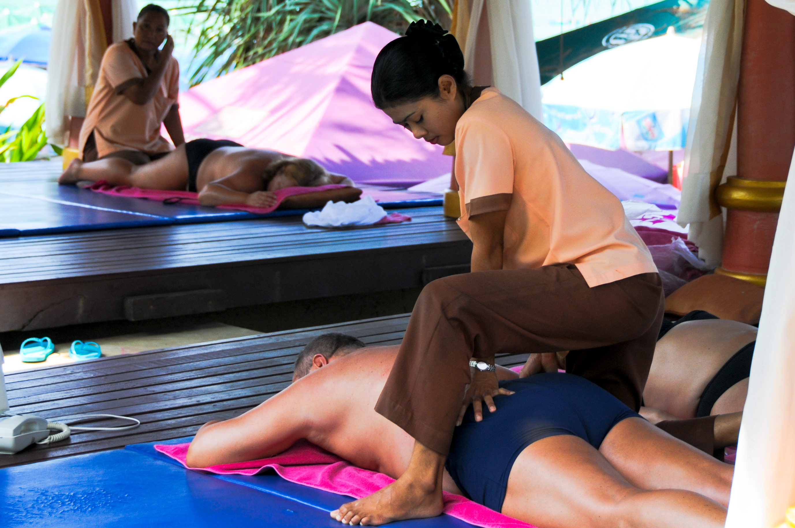 Kata Beach Hotel, Phuket.Thailand